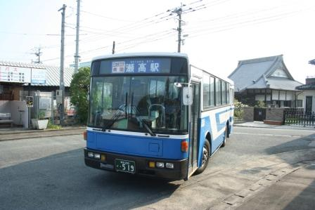 山鹿線を引き継いだ九州産交バス